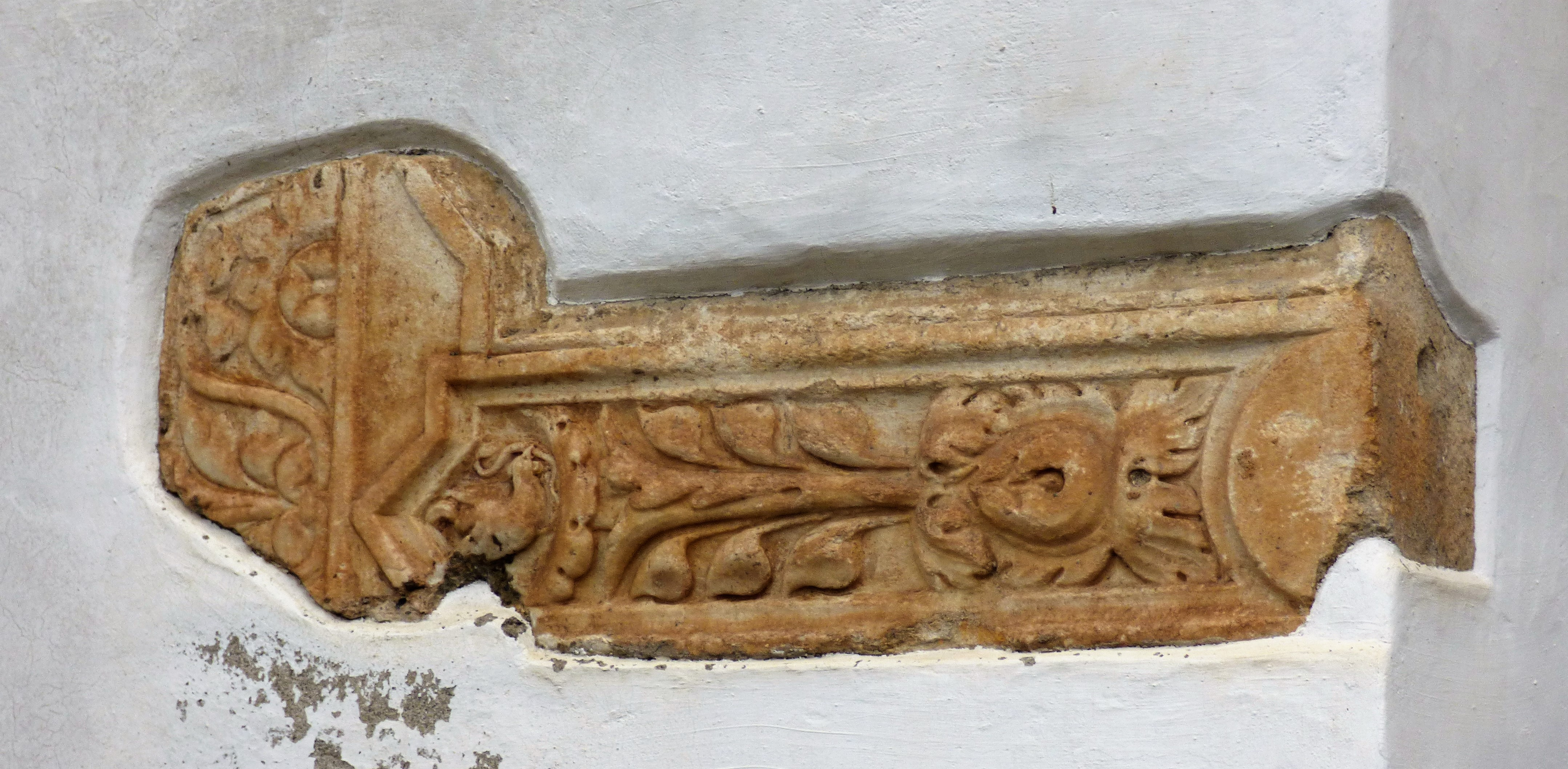 Römerstein an der Südseite der Kirche Mariae Himmelfahrt, St. Marein (Gemeinde Neumarkt), Steiermarkt